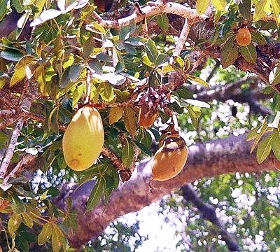 Múcua (Baobab fruit)